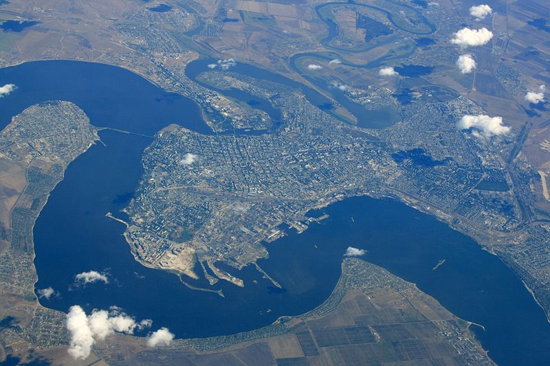 Вид на Николаев и Южный Буг с высоты около 10 км.